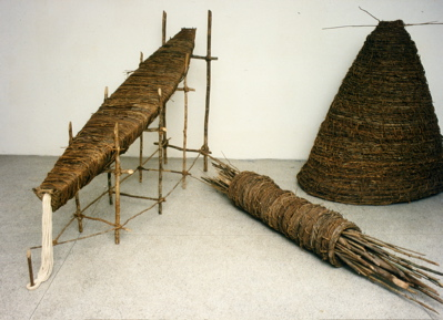 Carvalho, Francisco Klinger, Escultura Sobre o Sol o Descanso, 1993, Madeira